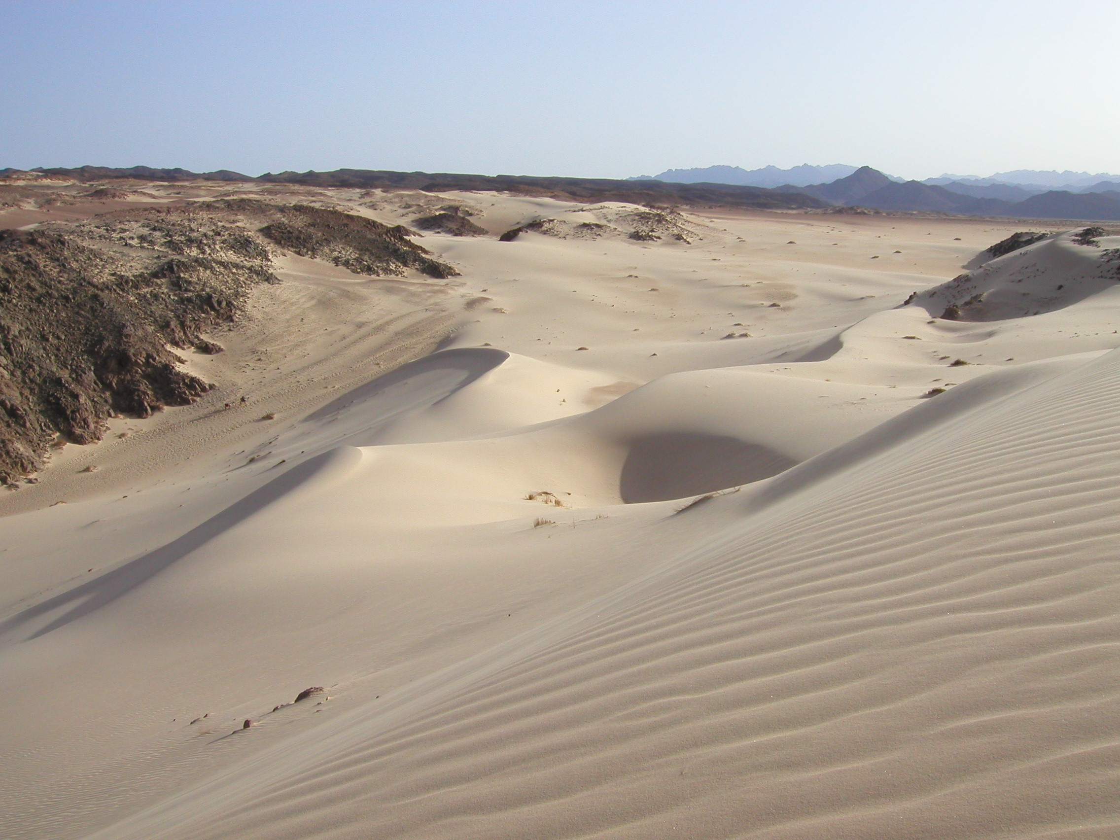 Wüste Sina - Trockenwüste